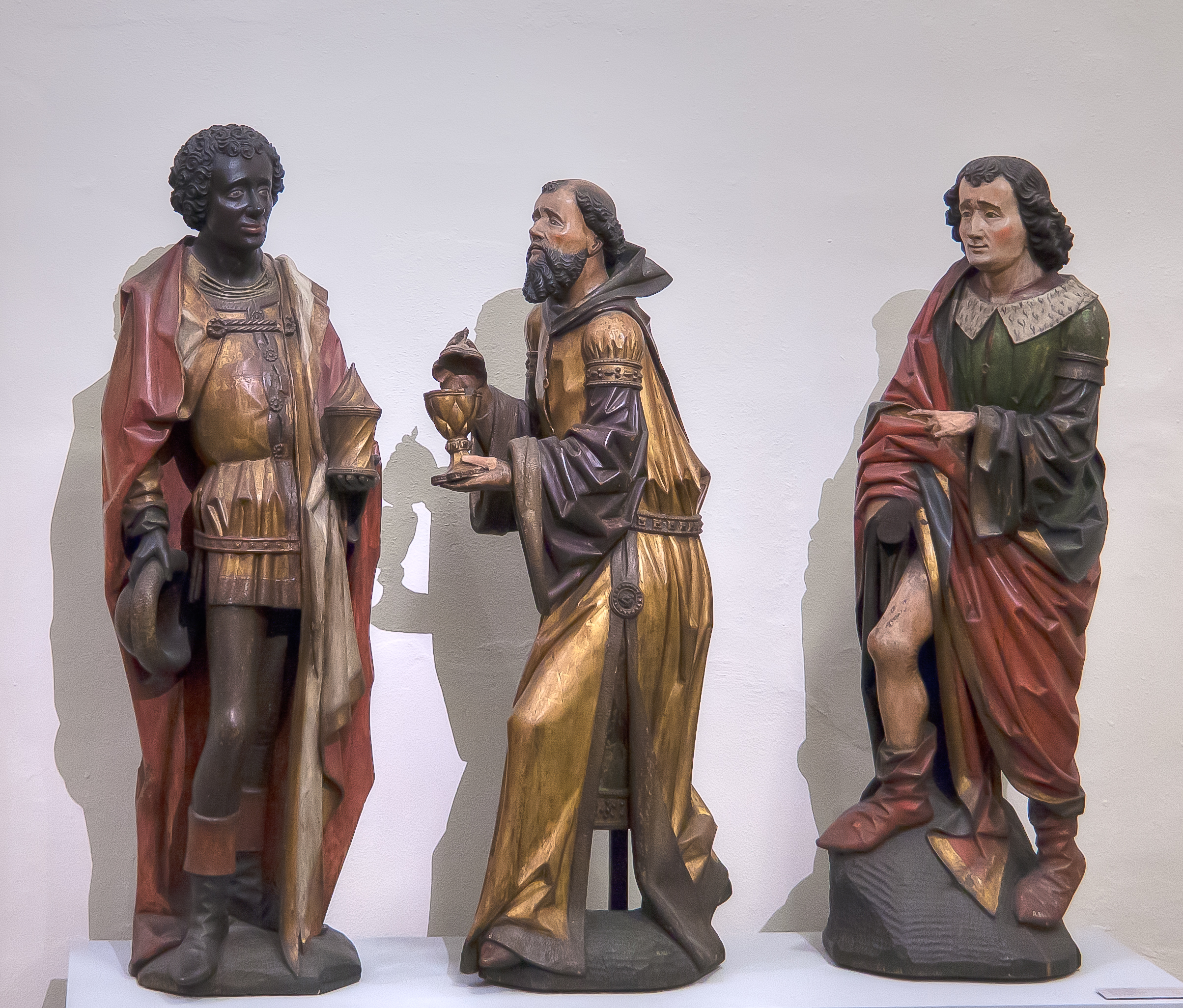 Skulpturengruppe der Hl. Drei Könige im nördlichen Seitenschiff